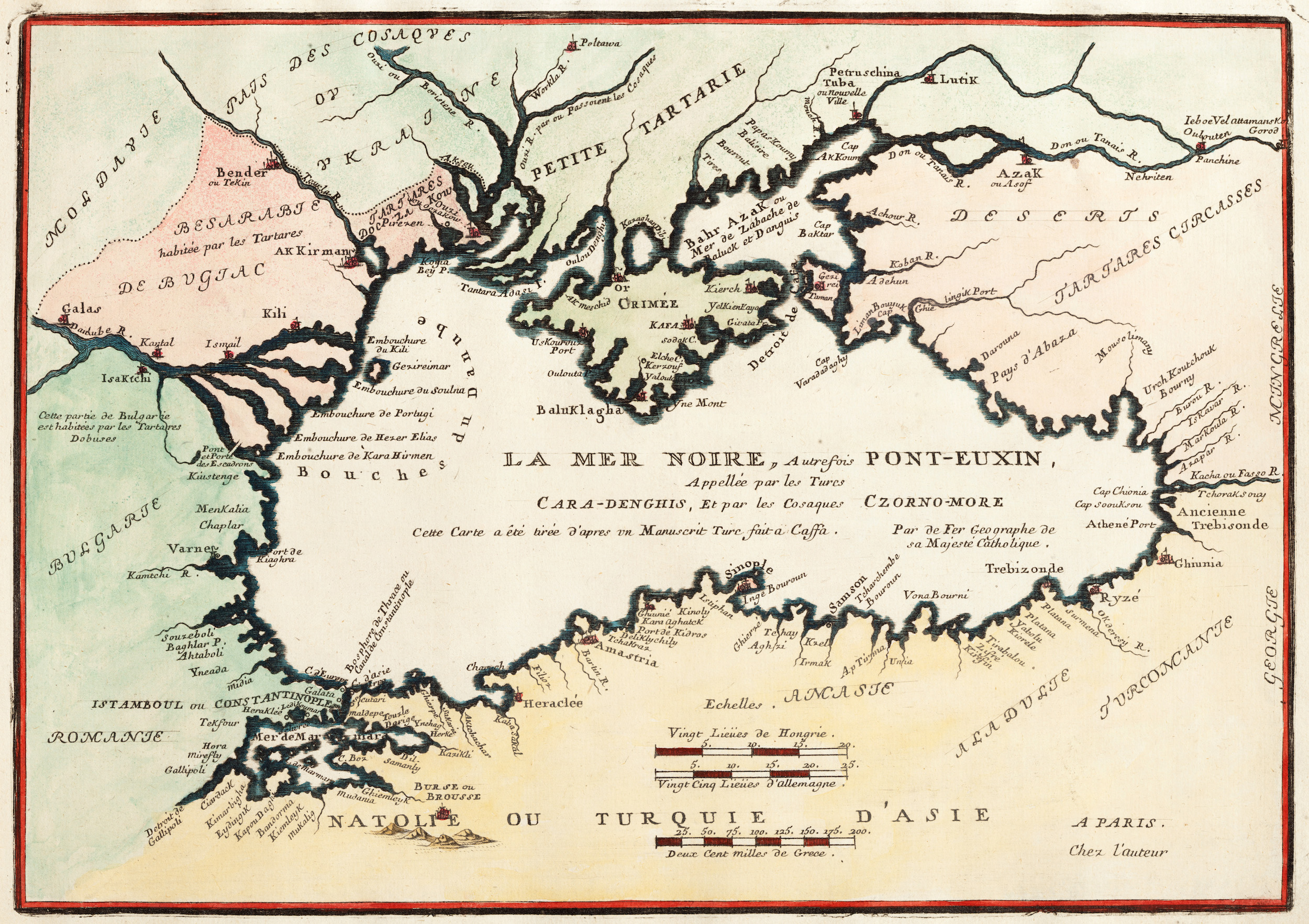 La Mer Noire Autrefois Pont-Euxin, Cara-Denghis Et par les Cosaques, Nikolas de Fer (Paris, 1705) «Карта Чорного моря» Ніколя де Фера (1705 р.). Її вирізняє лаконічний художній виклад, чіткі обриси моря, де вказано фактично усі вживані тогочасні назви, разом з «Як його називають козаки, Чорне море» [et par les Cosaques Czorno more]. Нижнє Подніпров’я позначене за французькою традицією із винесенням на перший план домінантного на той час терміну «козаки»: «Земля козаків або Україна».